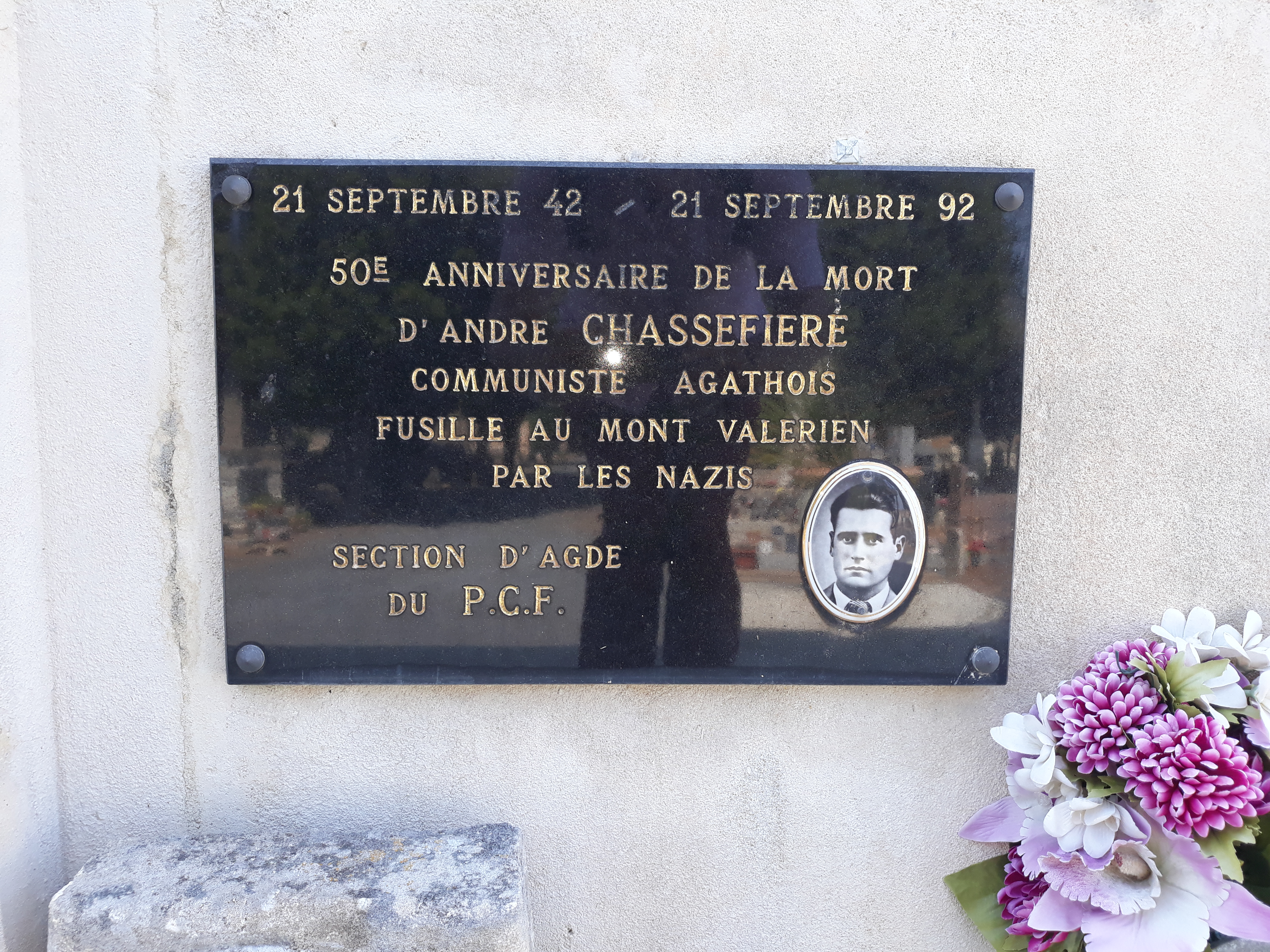 Gedenktafel für den französischen Kommunisten und Widerstandskämpfer André Chassefière auf dem Friedhof von Agde (Hérault).